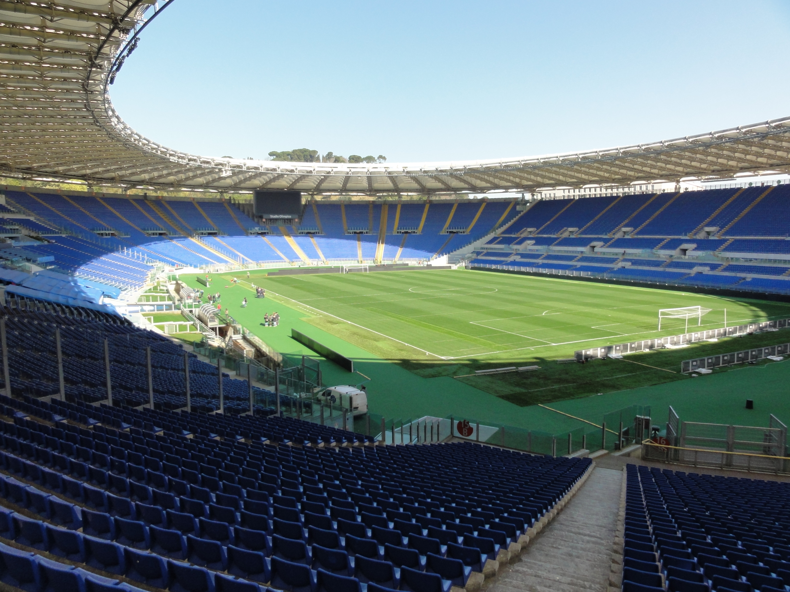 l'Olimpico